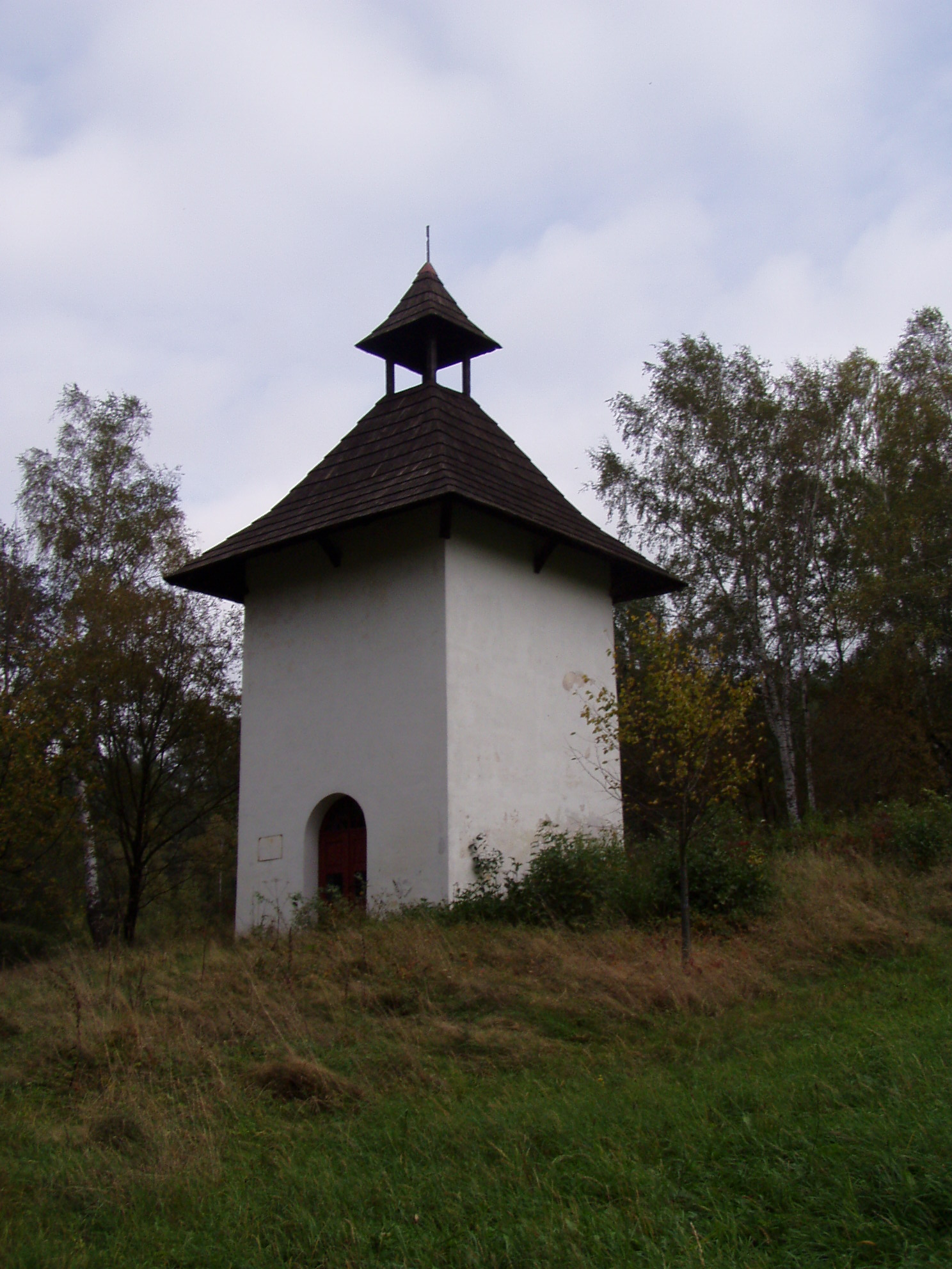 Kaple sv. Jana Nepomuckého v Bystrém